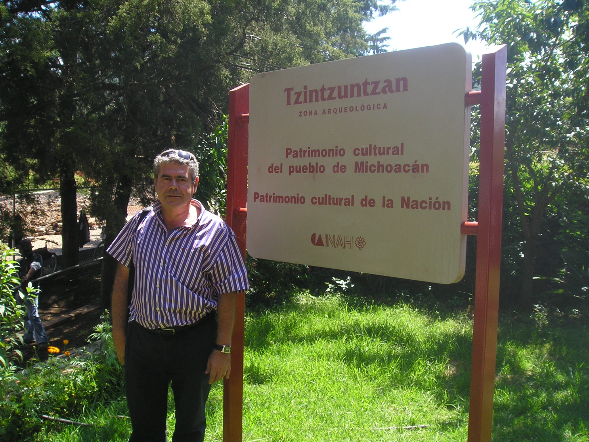 Iñaki Beti Mexikon